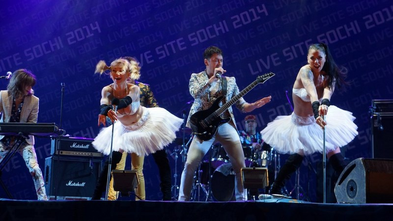 Группа "На-На" выступает на Олимпиаде в Сочи, 2014 год